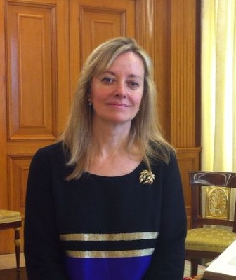 Clara Careaga, Magistrado del Tribunal Supremo y Vocal del Consejo General del Poder Judicial español, en el Palacio de la Zarzuela, el día de su toma de posesión ante el Rey.